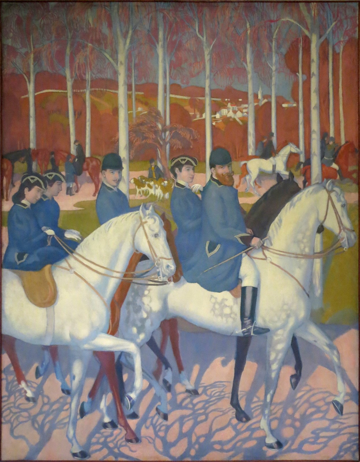 La légende de saint Hubert, Le Départ, 1er tableau